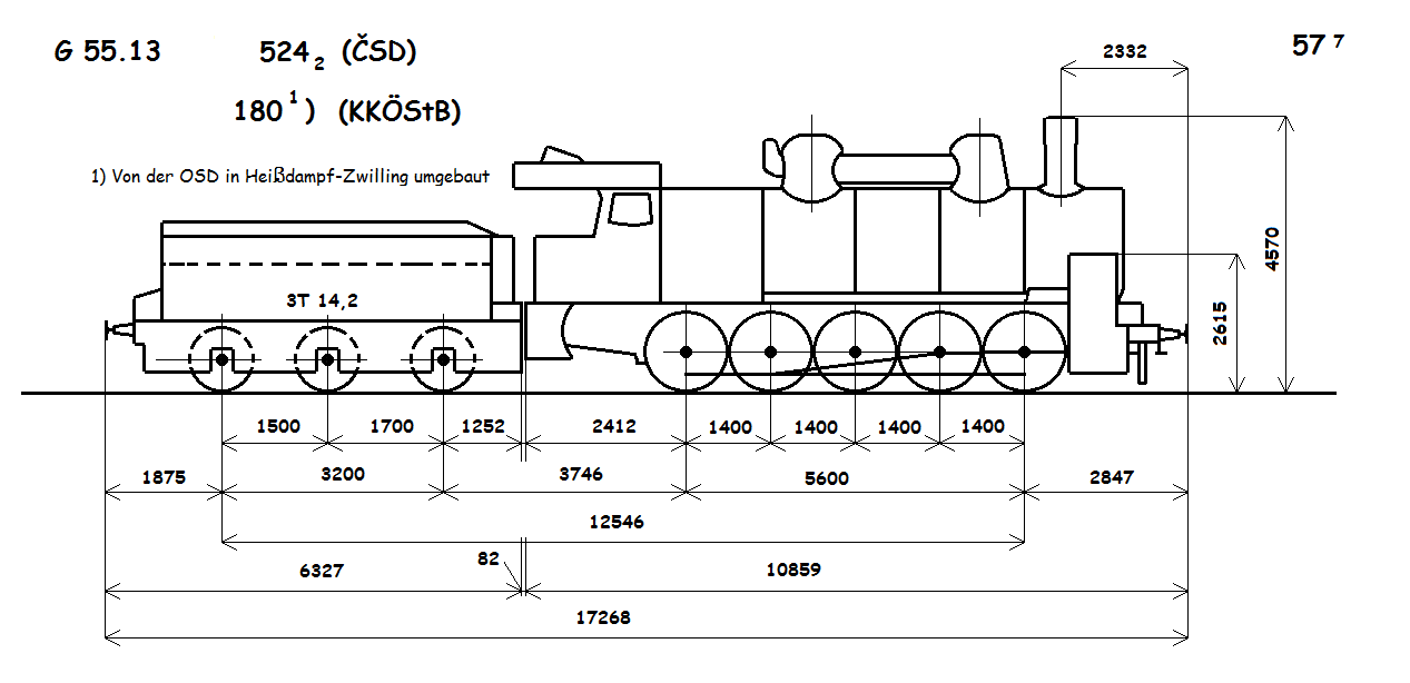 Schéma s rozměry lokomotivy řady 180 kkStB. Vytvořeno v programu malování dle výkresové dokumentace z publikace Železnice v Sudetech : 1938-1945, ISBN 80-903346-0-1. (Kniha je dostupná ve Studijní a vědecké knihovně v Hradci Králové.) Na požádání mohu poskytnou plnou verzi souboru ve formátu BMP 2.22 MB.